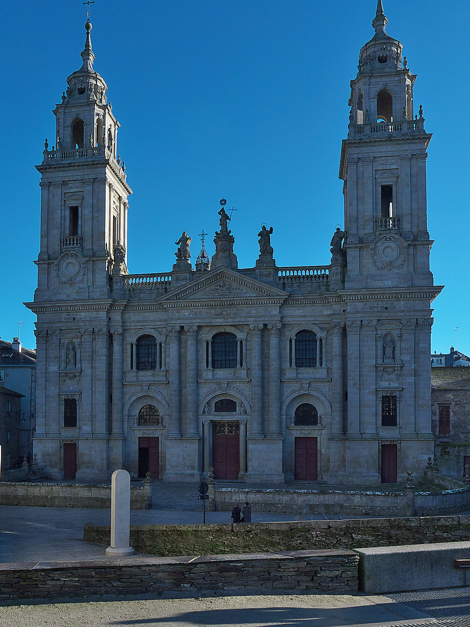 La urgente necesidad de sustituir la fachada de los pies de la catedral (1769), decide encargar a Julián Sánchez Bort el proyecto. Miguel Ferro Caaveiro, maestro mayor de la catedral compostelana, con la supervisión de Ventura Rodríguez, modifica algunos elementos y la concluye (1778), exceptuando las torres, obra de Nemesio Cobreros Cuevillas (1878).